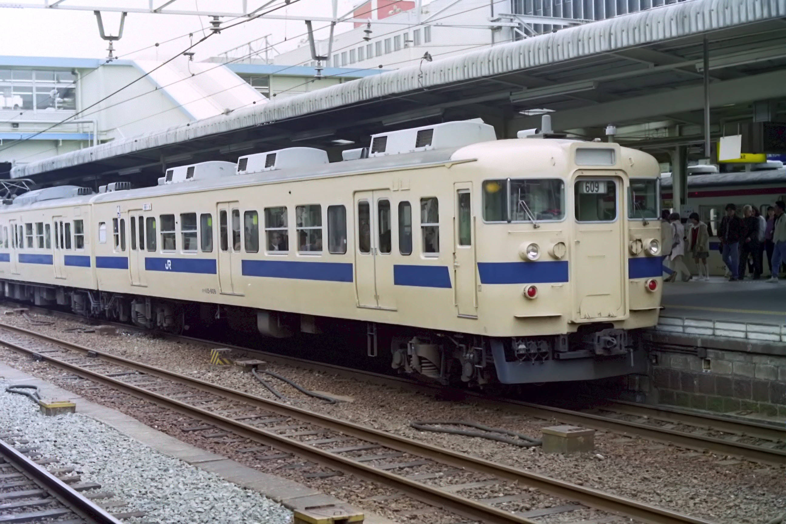 クハ115 609 広島駅